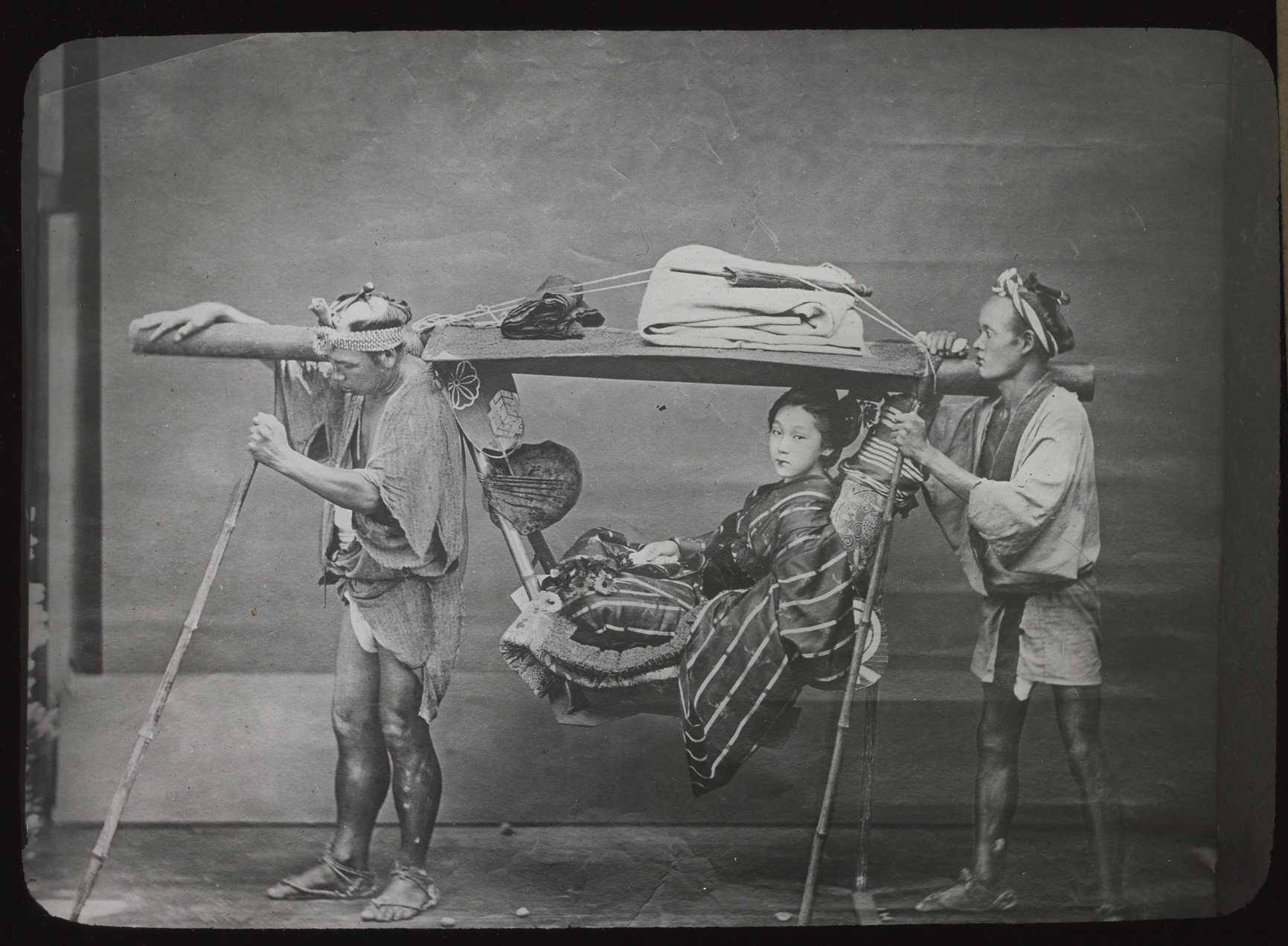 Palanquin Japonais, fonds Colbert